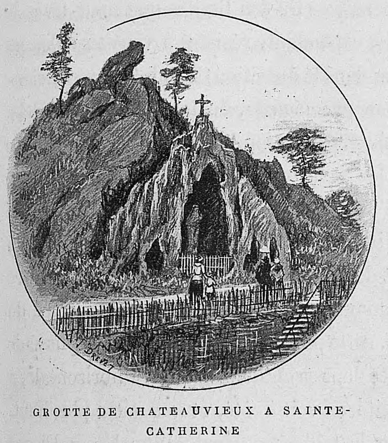 Aux environs de Lyon / Monsieur Josse ; préface de M. Coste-Labaume ; édition illustrée de 250 dessins de J. Drevet.